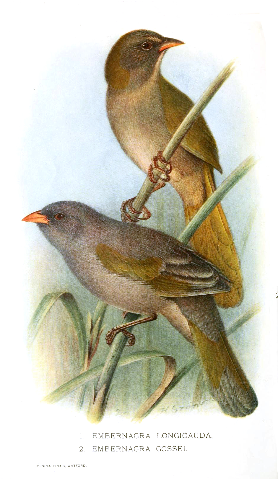 Embernagra longicauda and E. platensis gossei